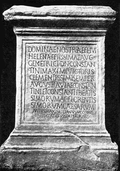 Dedica a Elena presso le Terme Eleniane (IV secolo d.C.)